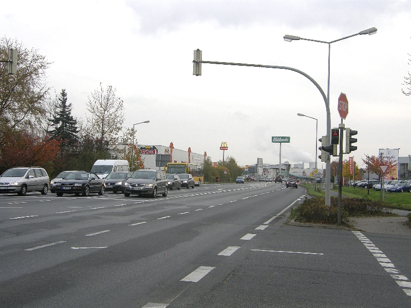 Das Bild zeigt die Sicht in Fahrtrichtung Hannover, an der Kreuzung mit den Straßen "Baßriede" auf der Westseite (Standort) und der "Rote Reihe". Die kreuzenden Straßen befinden sich beide vor dem Fotografen. Im Hintergrund ist eine Verschwenkung der Fahrbahn zu sehen, ab der die B6 einen mittleren Grünstreifen aufweist. Dieser soll ab Juni 2010 in Richtung Nienburg auf 3 Kilometer Länge fortgesetzt werden.